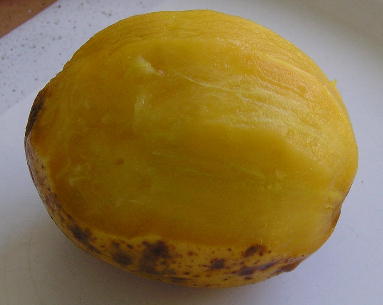 Cajamanga descascada